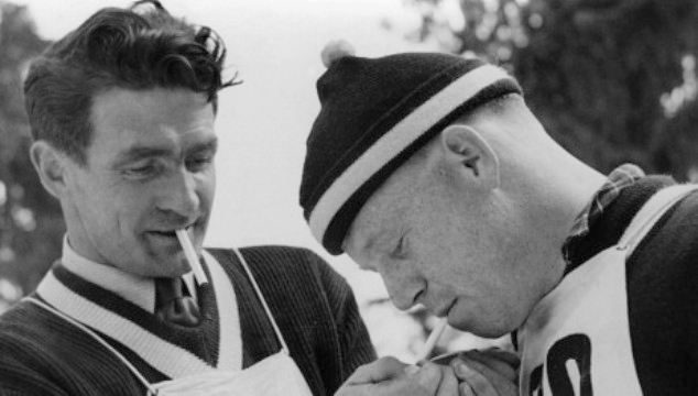 Simon Slåttvik and Erling Kroken at the 1952 Holmenkollen